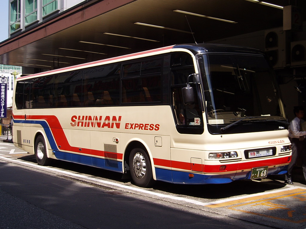 Shinnan Kotsu "Chuo Highway Bus" Mitsubishi U-MS821P at Shinjuku Highway Bus Terminal